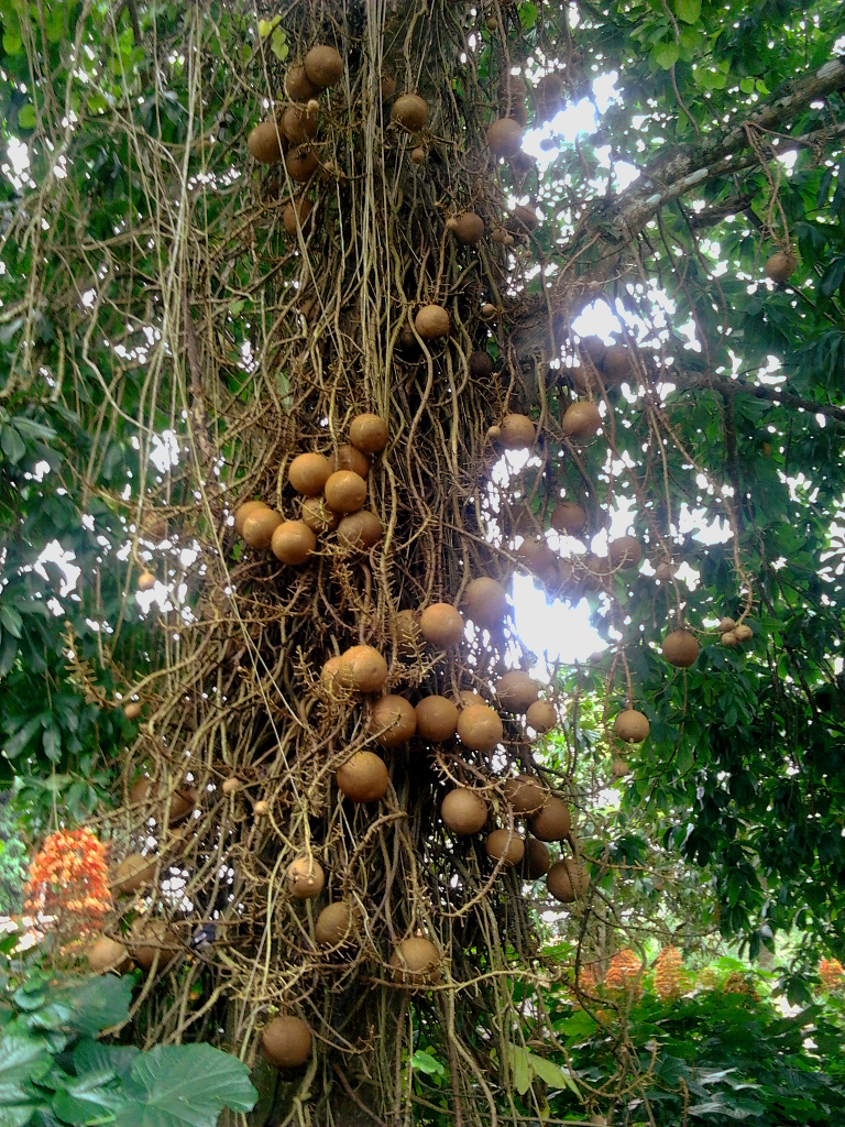 നാഗലിംഗമരം